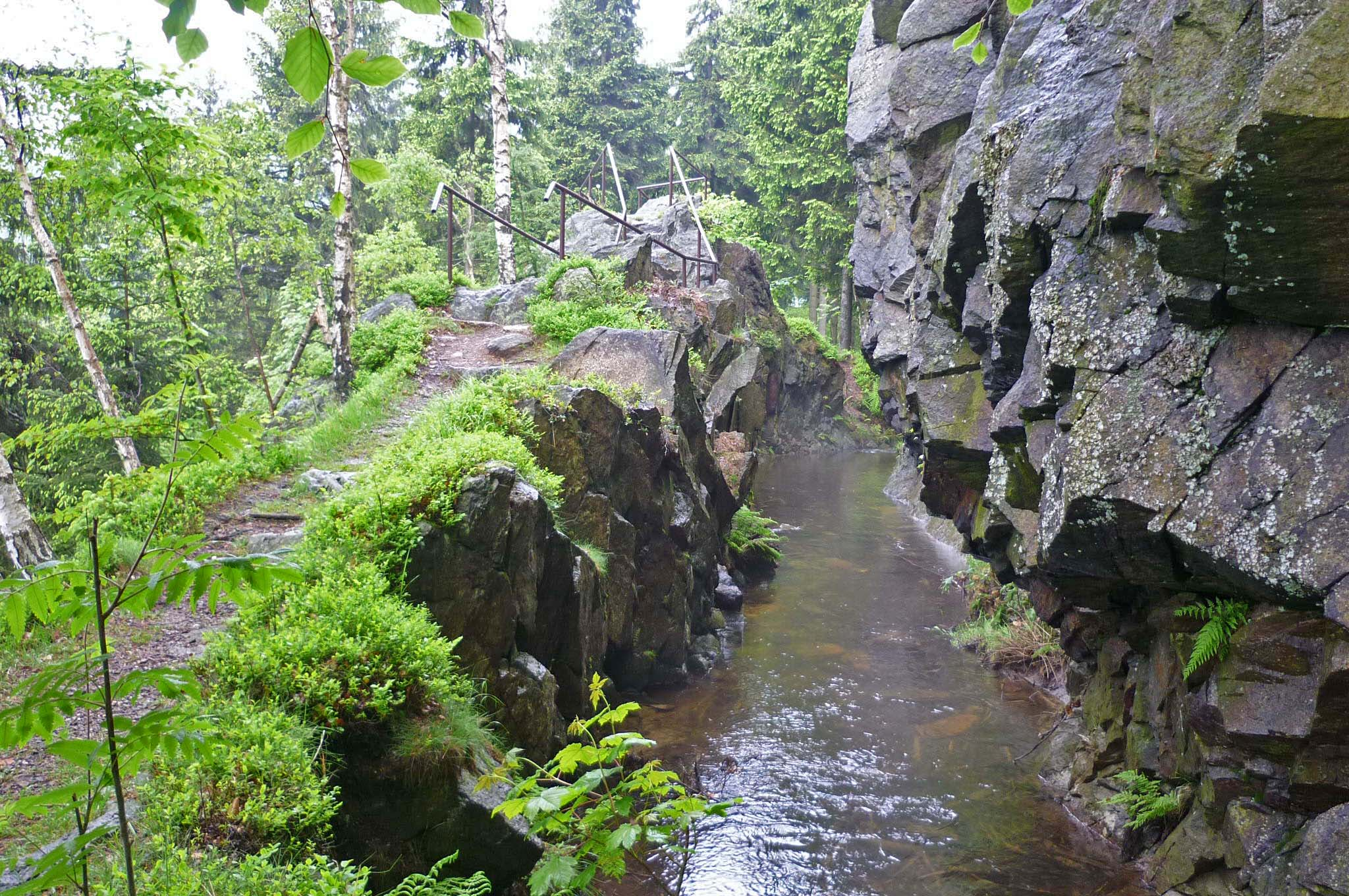 Felsdurchbruch am Floßgraben auf böhmischer Seite oberhalb von Georgendorf (Český Jiřetín)